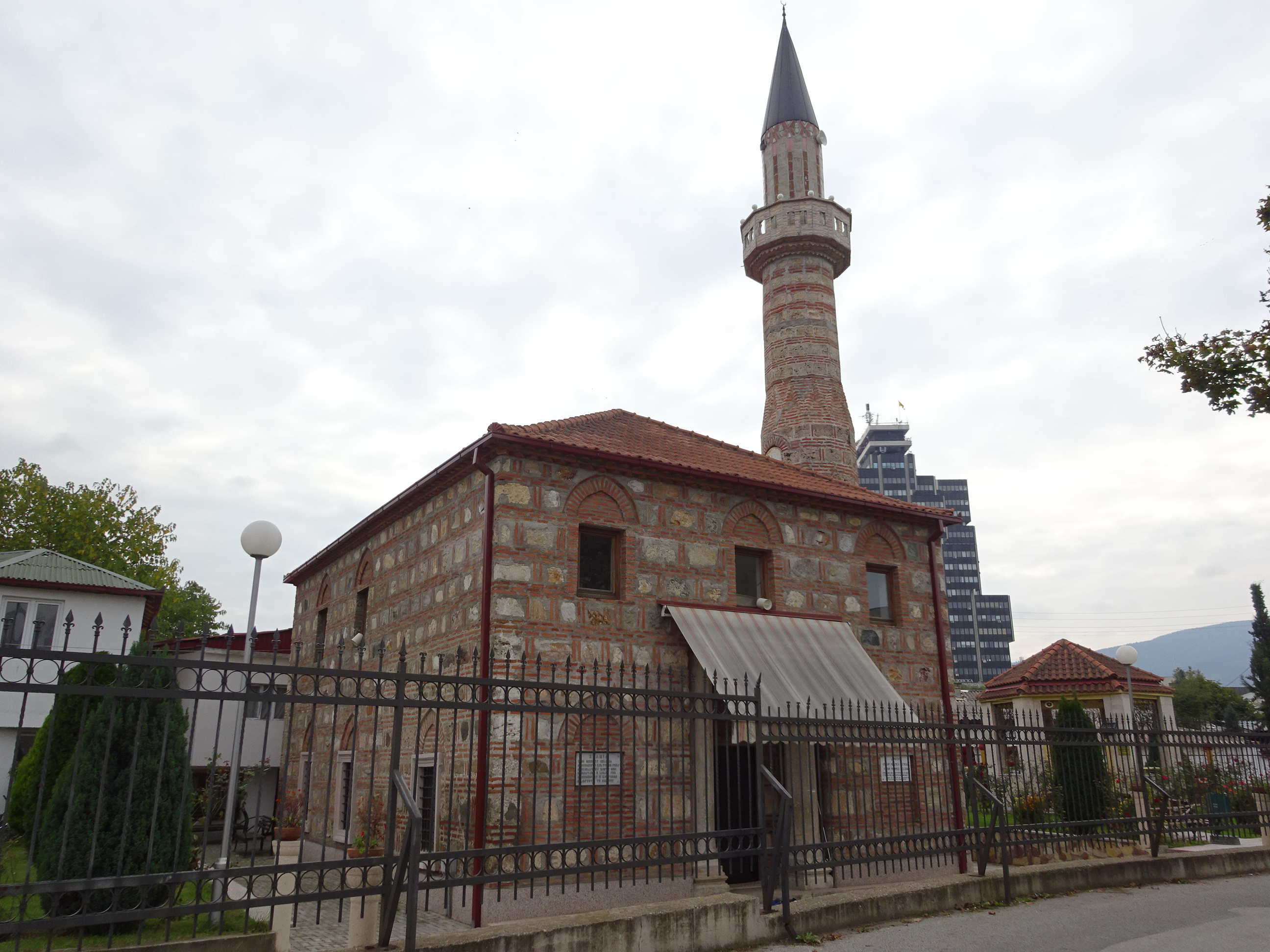 Џамија Кебир Мехмед Челеби во Скопје Ова е фотографија на споменик на културата во Македонија со типски код: A02This is a a photo of a cultural monument in North Macedonia with type id: A02